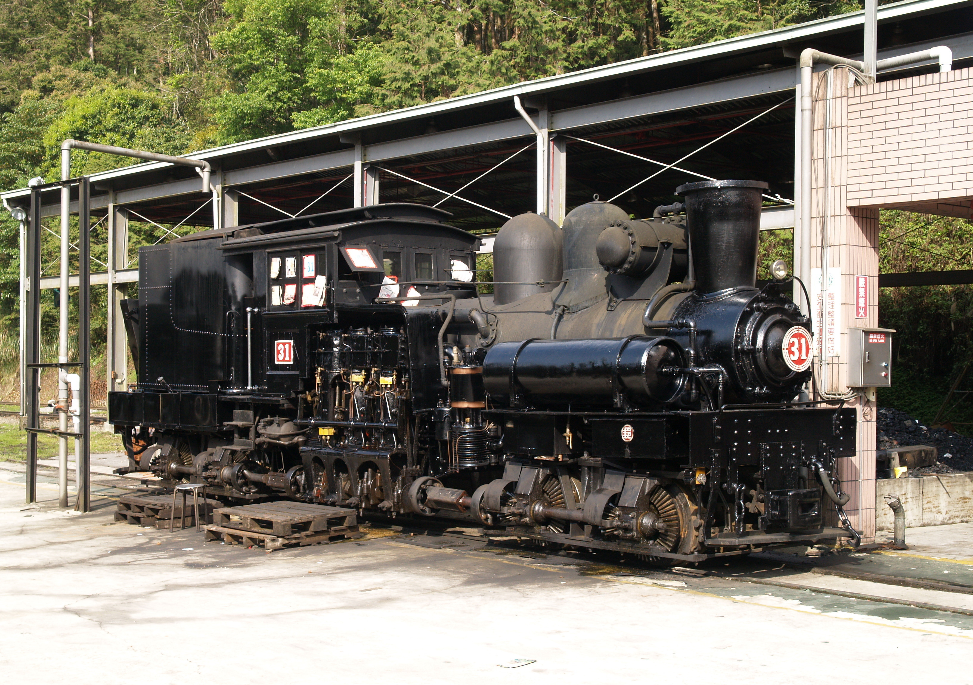 AliShan-Waldbahn Shay-Dampflok Nr. 31, betriebsfähig abgestellt im Betriebshof AliShan, fotografiert am 08.04.2009